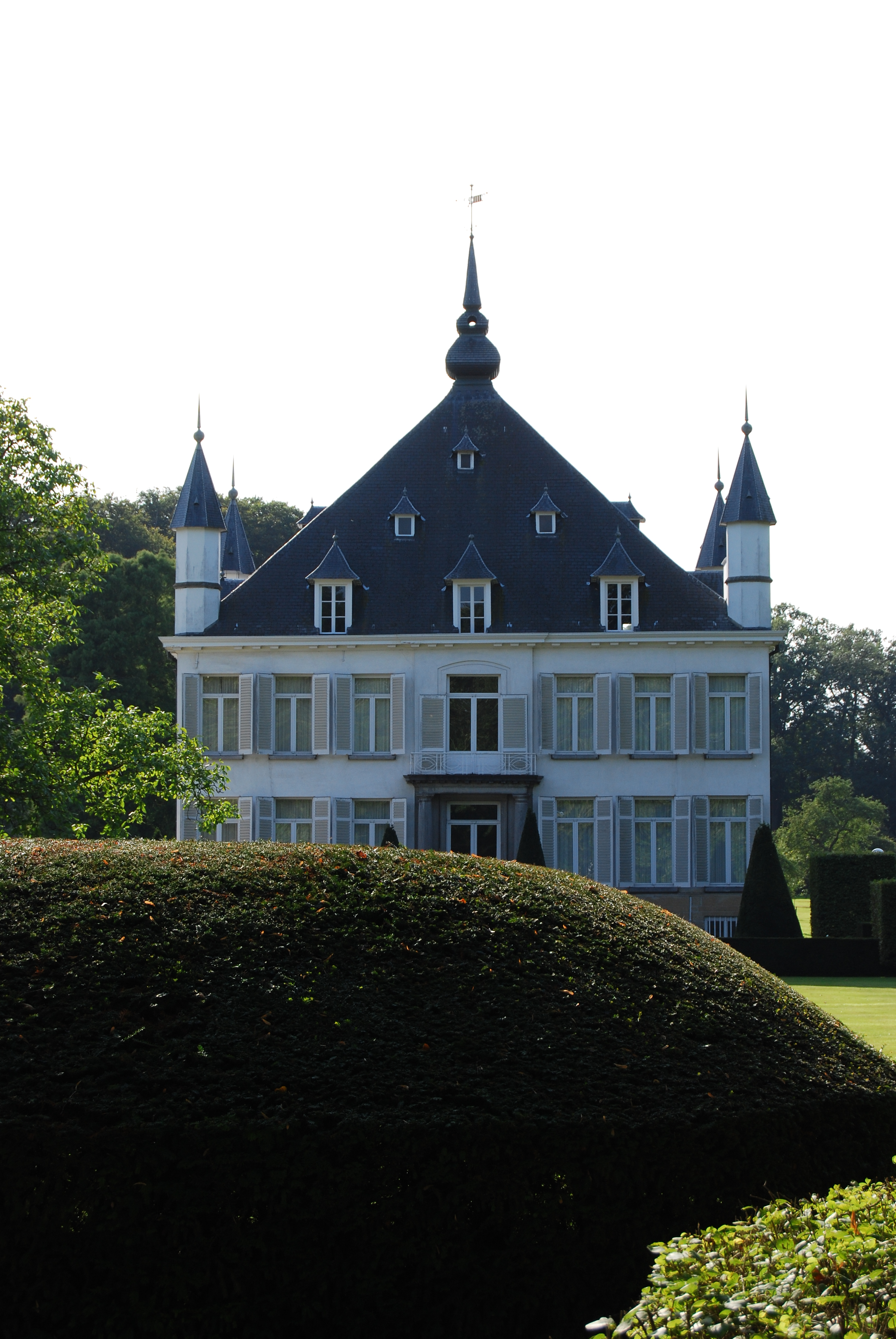 Kasteel met park te Steenhuize - foto genomen ter gelegenheid van de fotowedstrijd Wiki Loves Monuments België - 2012